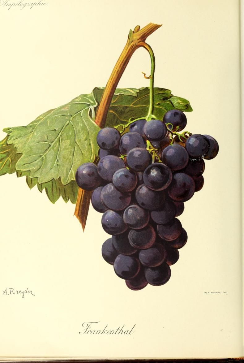 Illustration du cépage Frankenthal par Alexis Kreyder dans l'ouvrage "Ampélographie : traité général de viticulture" publié sous la direction de P. Viala & V. Vermorel avec la collaboration de A. Bacon, A. Barbier, A. Berget [et al.] - Date de l'édition originale : 1901-1910